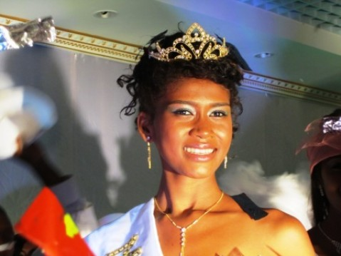 sacre Miss Madagascar 2012